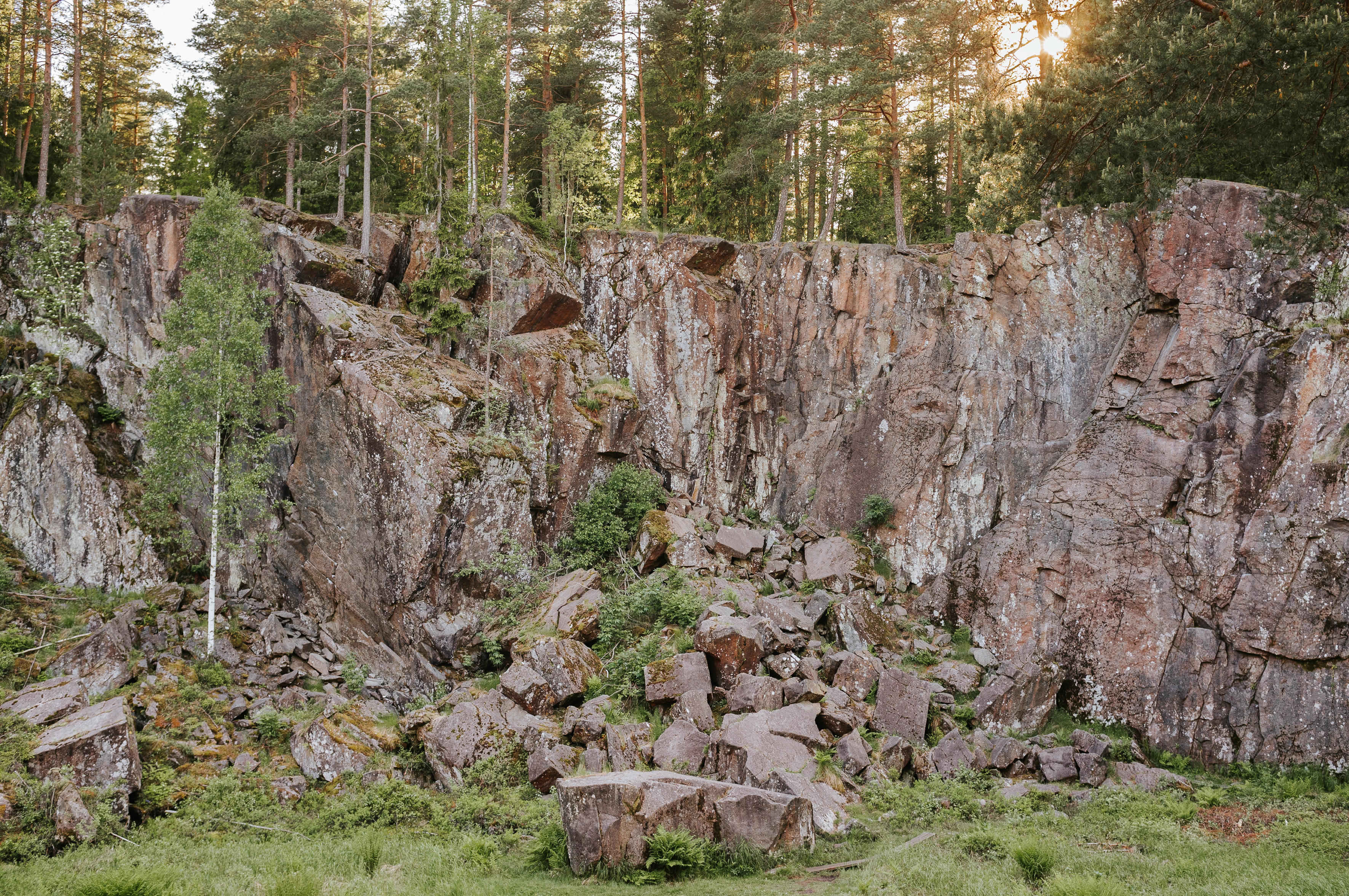 Västra sidan av strömrännan Domedagsdalen i naturreservatet Sveafallen i Degerfors.